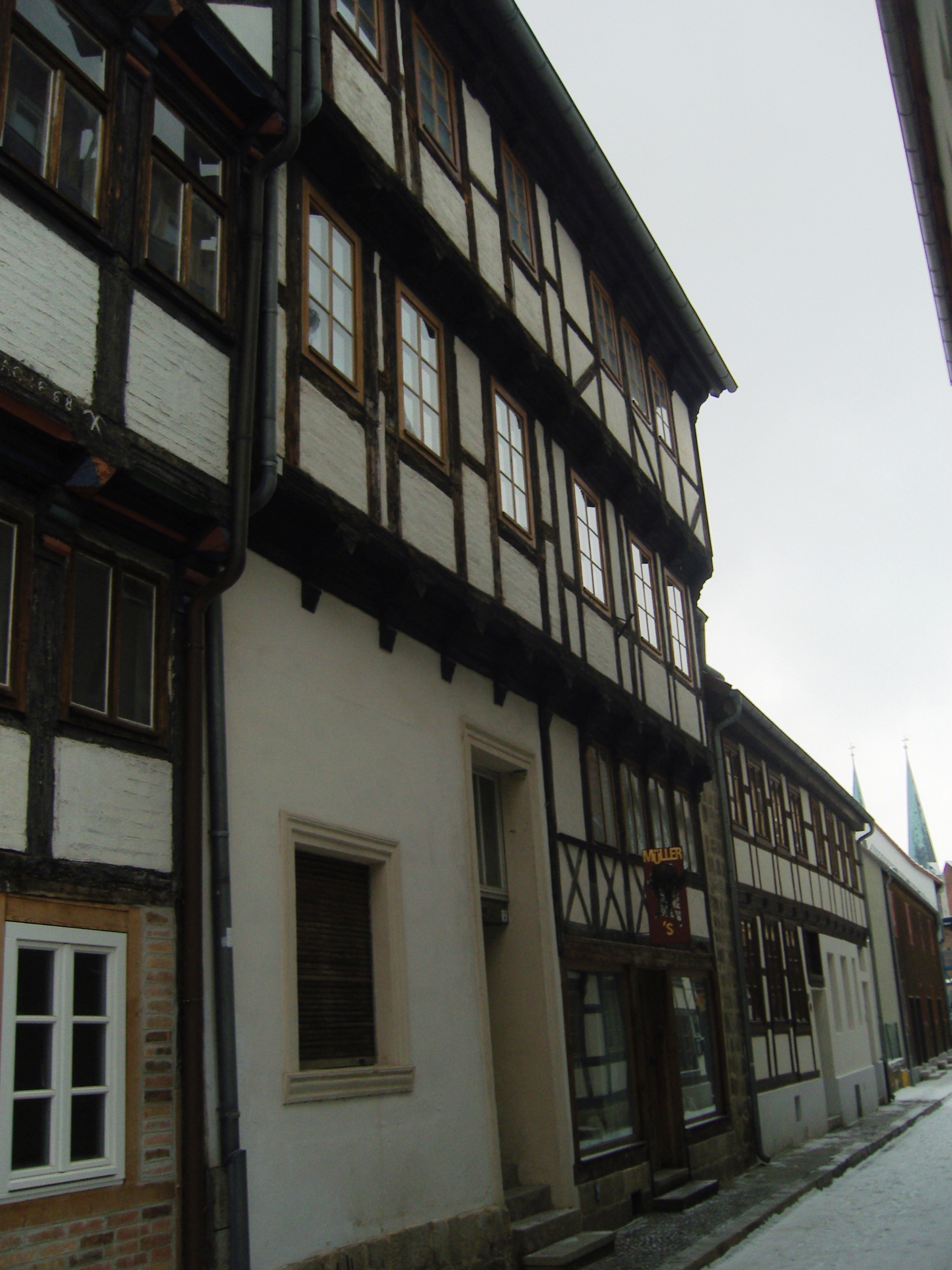 Denkmalgeschütztes Wohnhaus in der Straße Stieg 8 in Quedlinburg